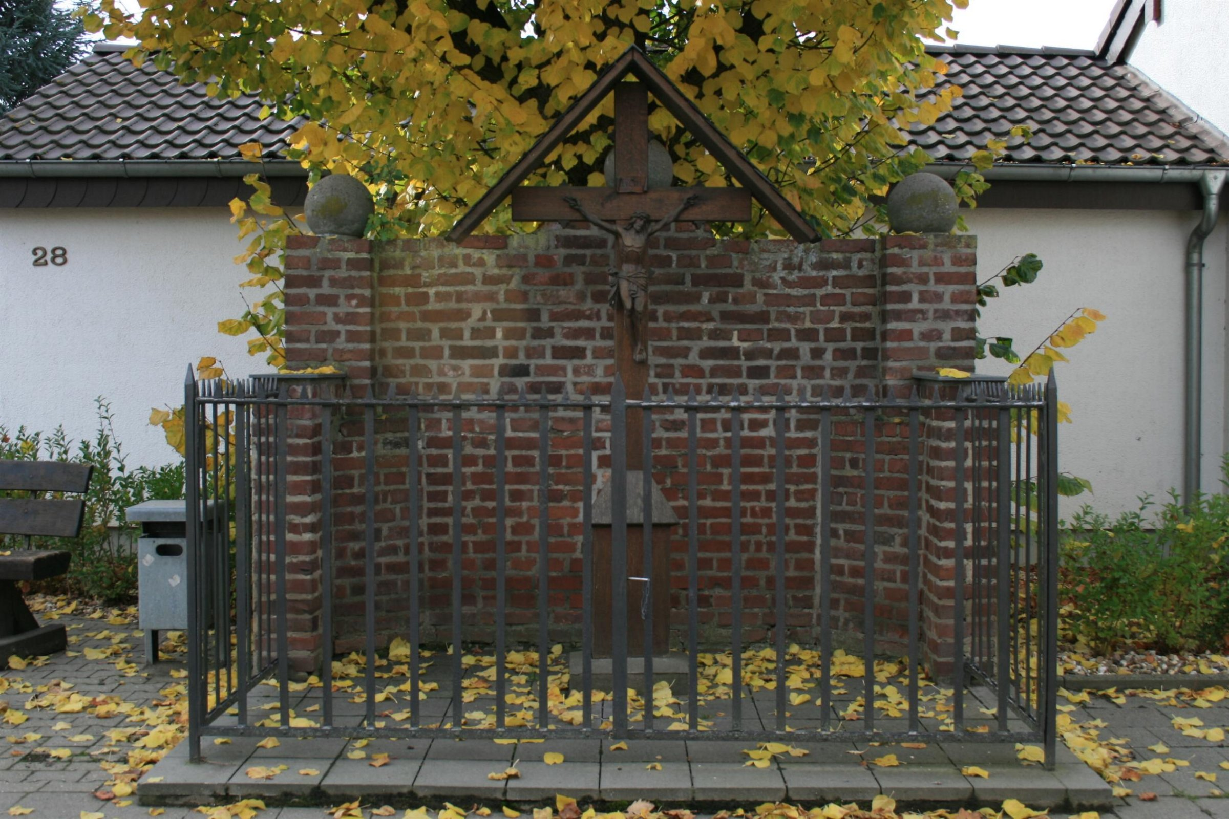 Das Wegekreuz am Ortsausgang in der Weißfrauenhofstr. in Nörvenich-Frauwüllesheim